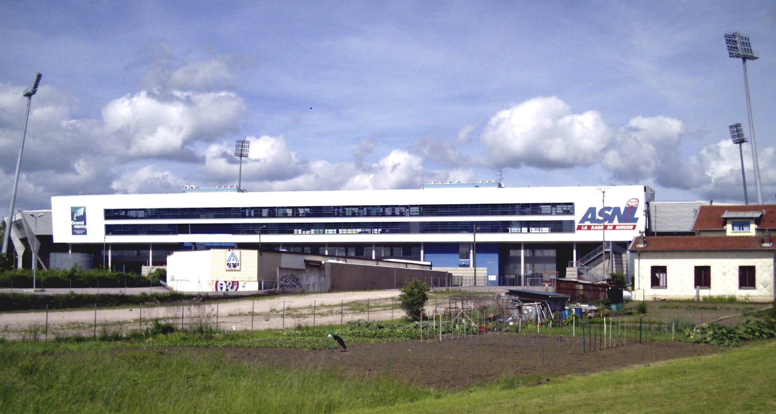 Stade Marcel Picot Nancy 54 France